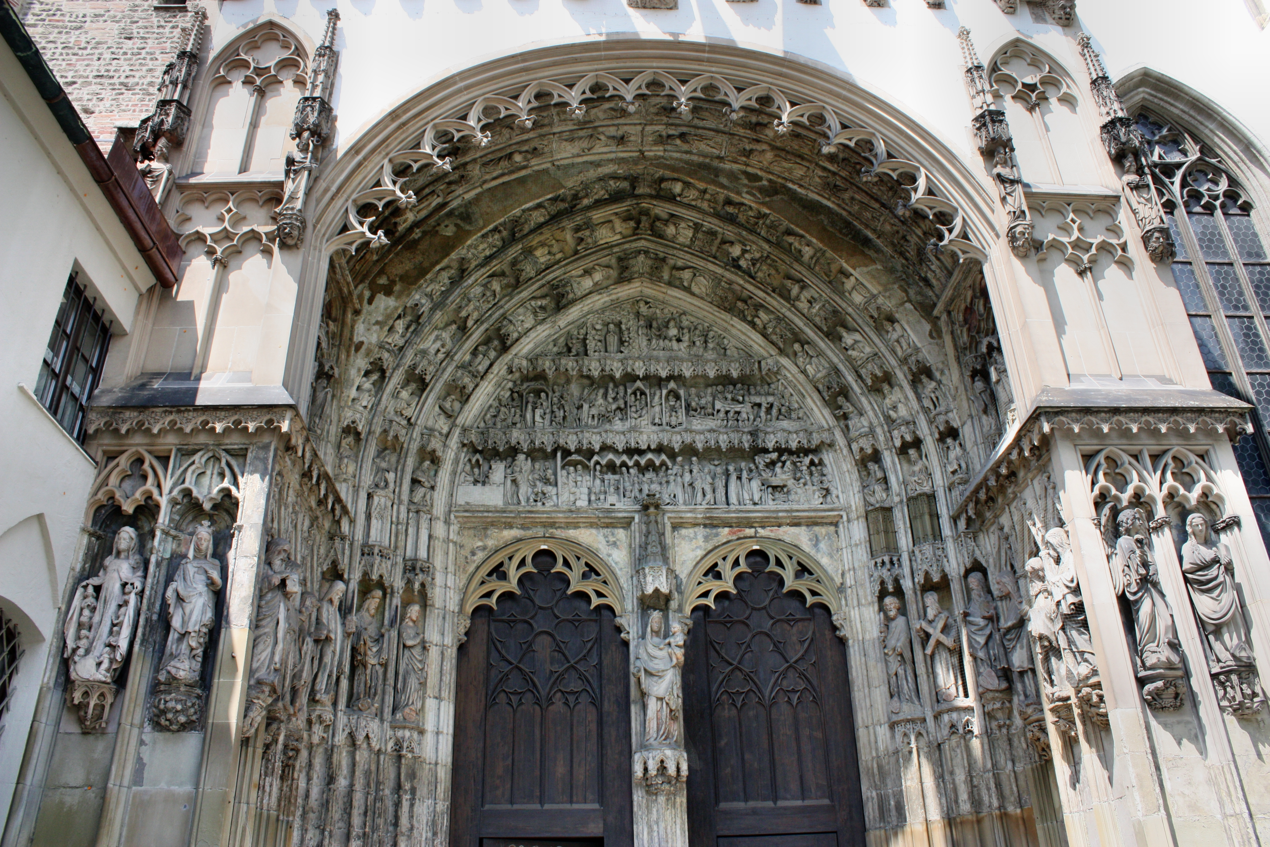 Eingangspforte zum Dom Unserer Lieben Frau, Augsburg